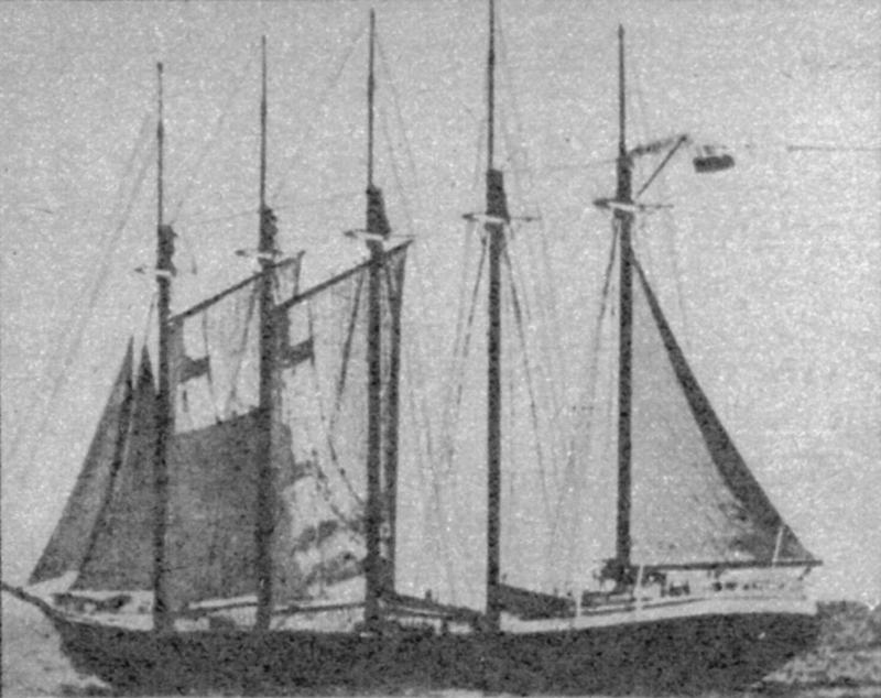 SV Elemka